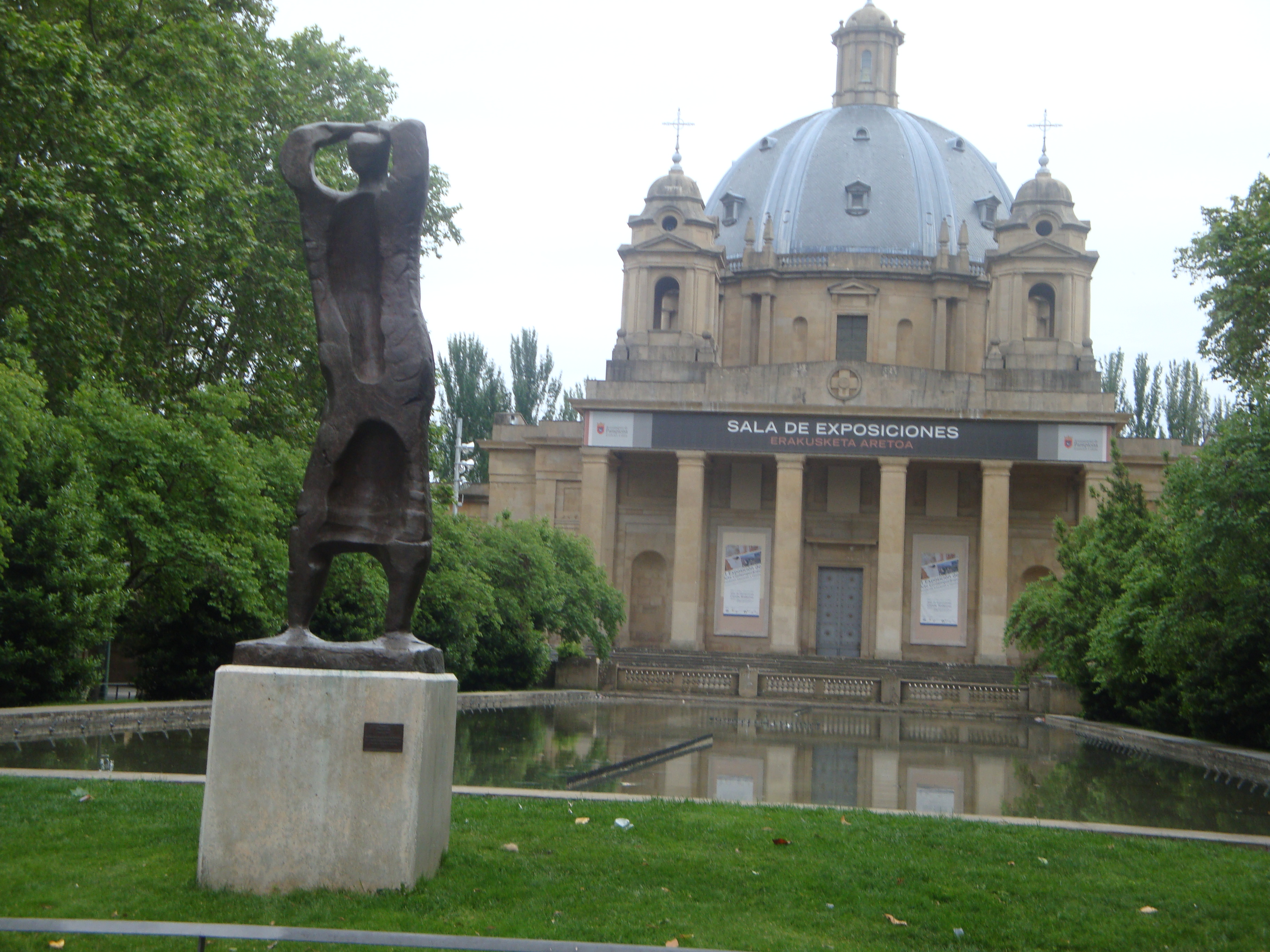 Monumnentoa los Caidos en Pamplona